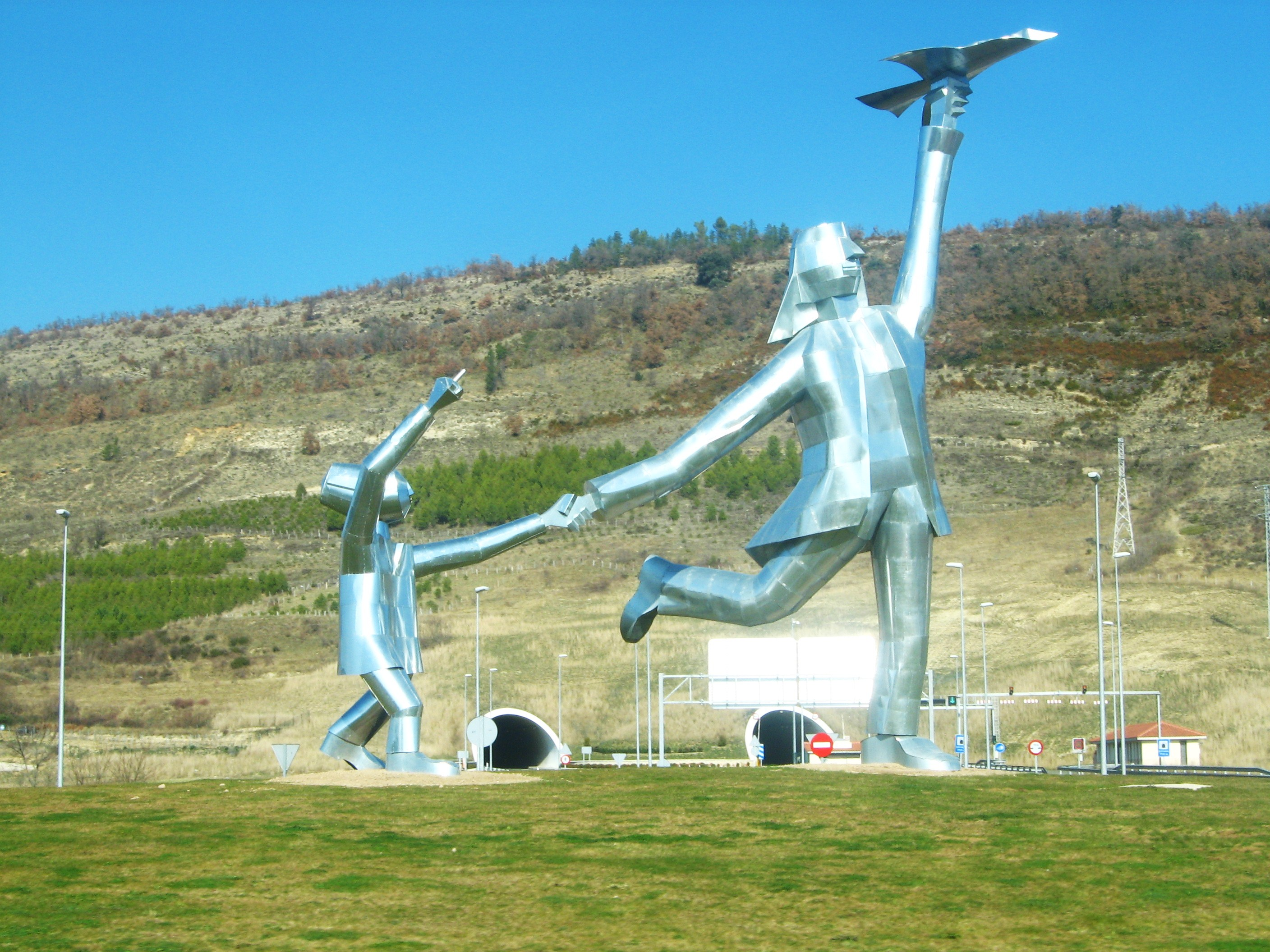 Pamplona, Navarra